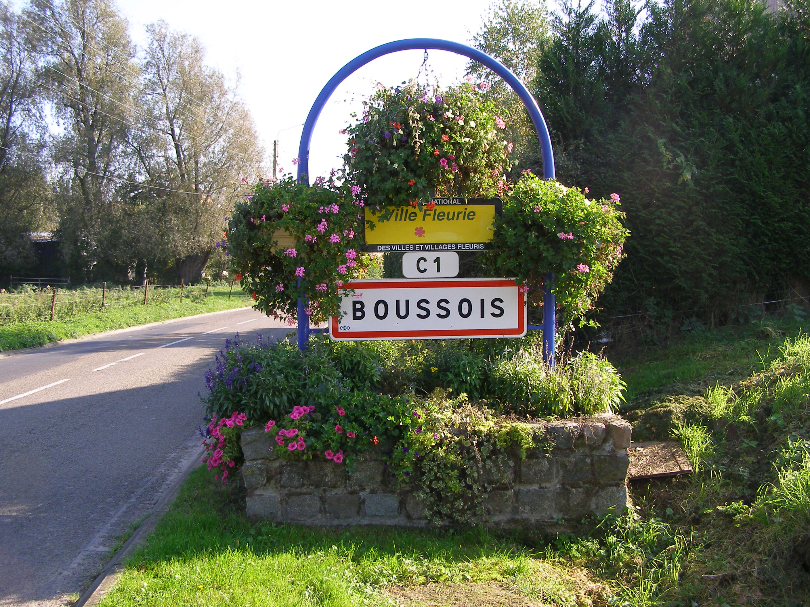 Entrée village côté Élesmes.